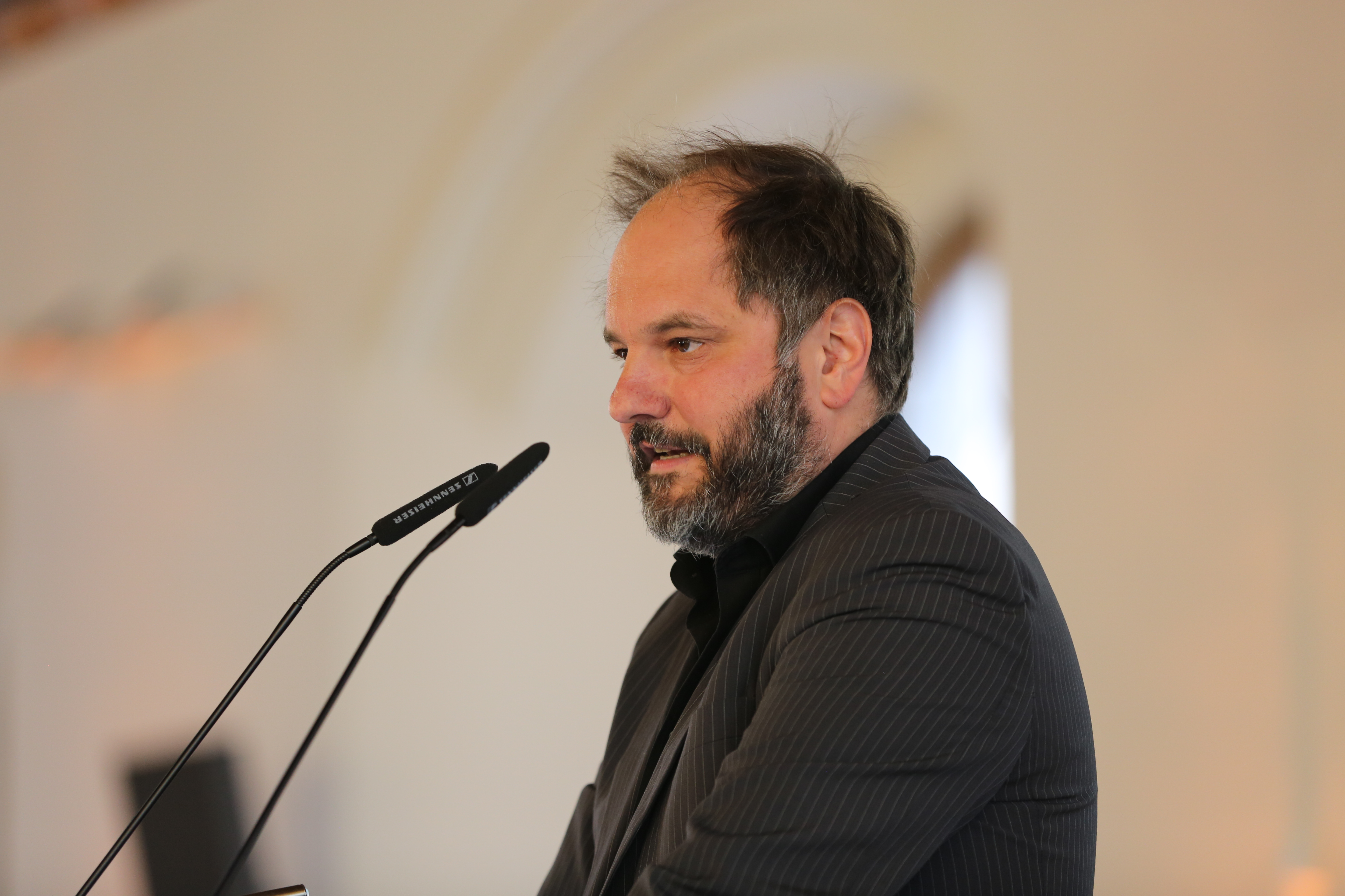 Matthias Egersdörfer als Laudator bei der Verleihung des Dieter-Hildebrandt-Preises 2019 an Christine Prayon im Alten Rathaus. München